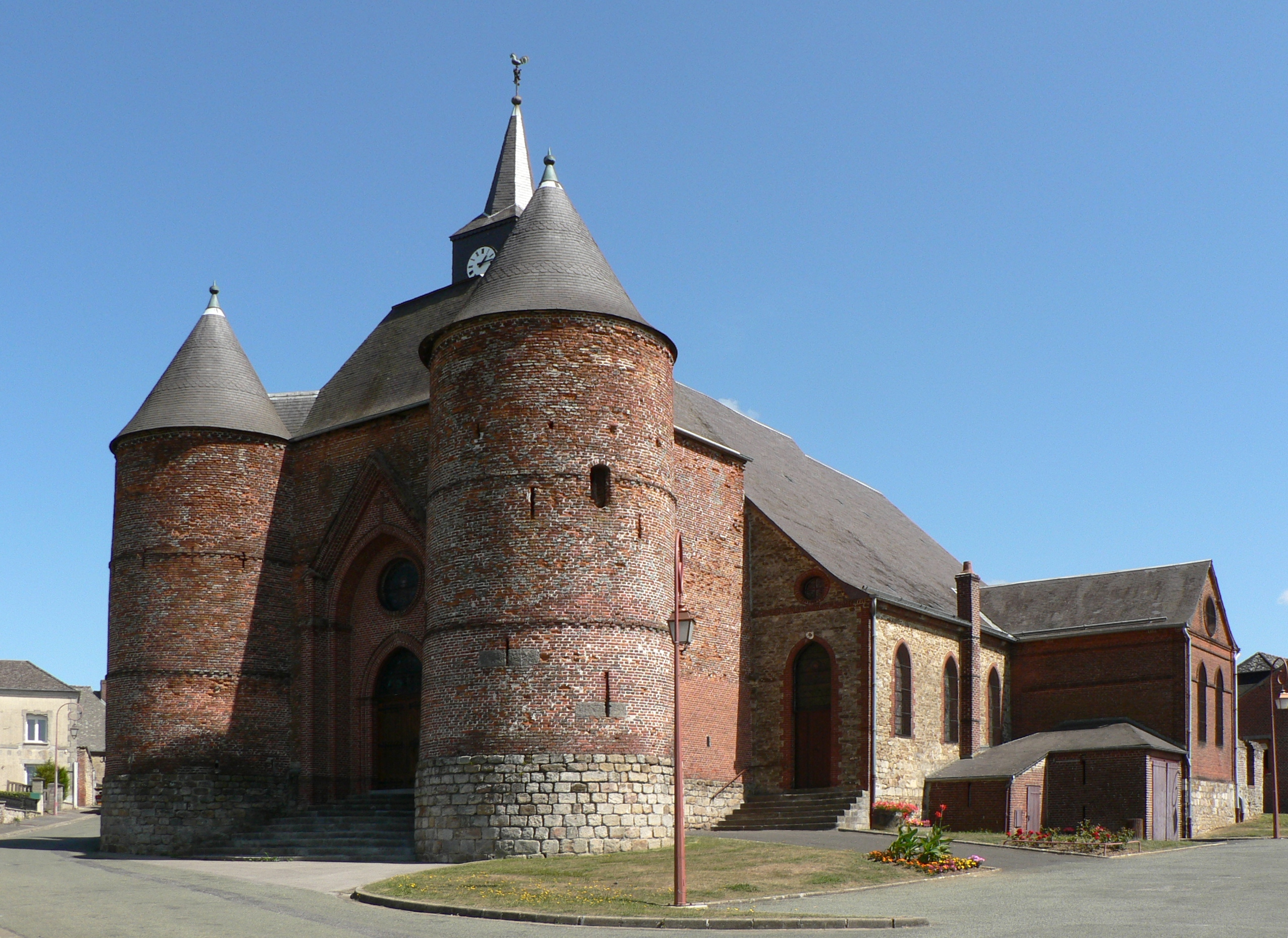 Eglise fortifiée de Wimy, Aisne, France